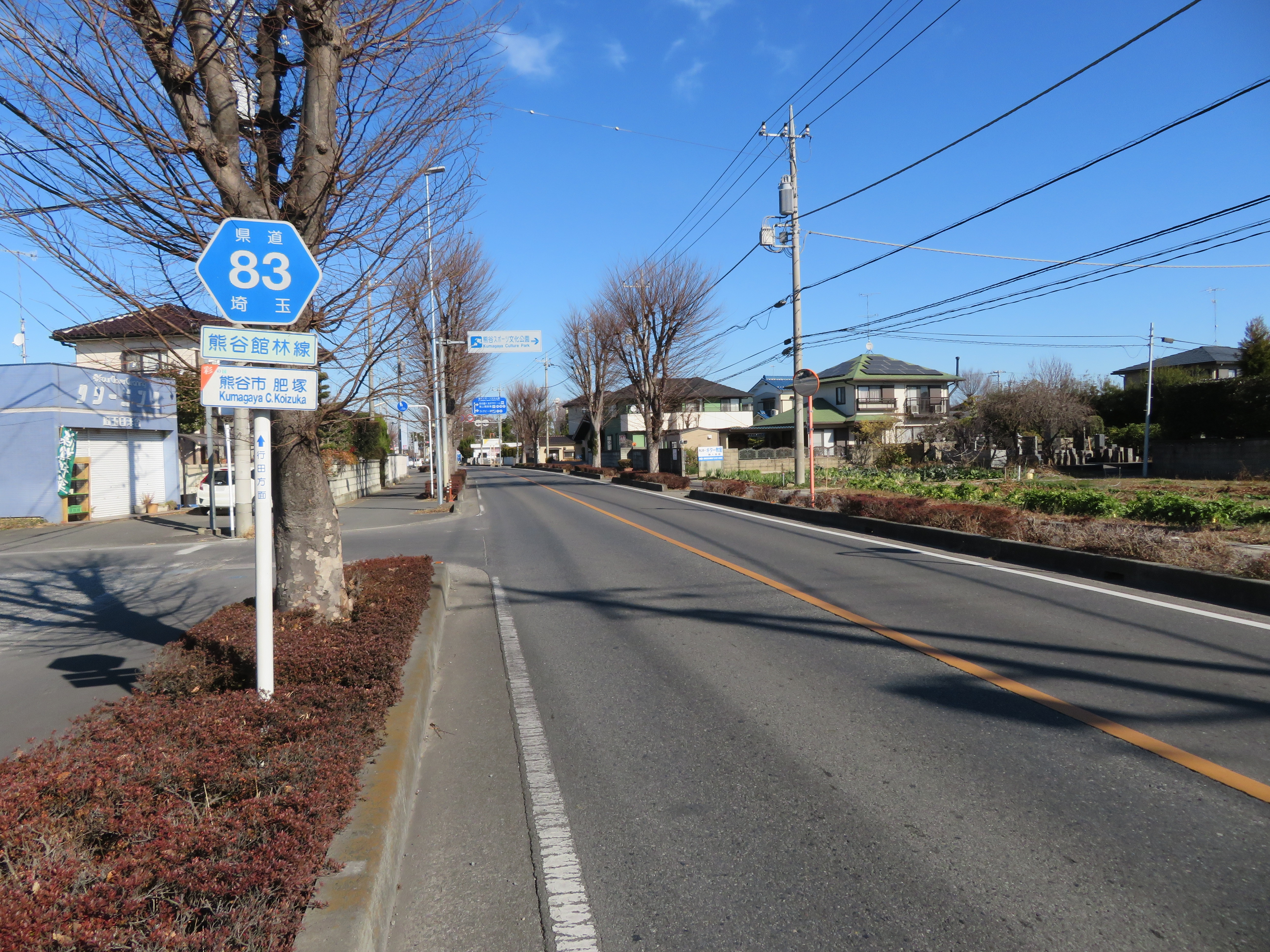 埼玉県道83号線熊谷市肥塚付近（行田方面を撮影） Canon PowerShot SX720 HS